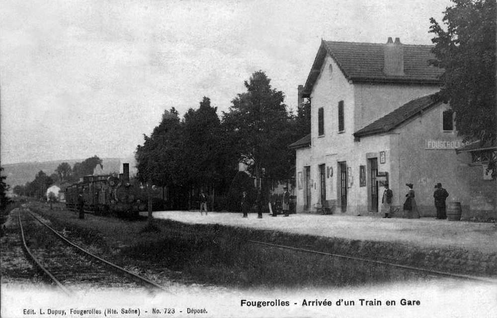 Arrivée d'un train à vapeur et intérieur de la gare de vers 1900.